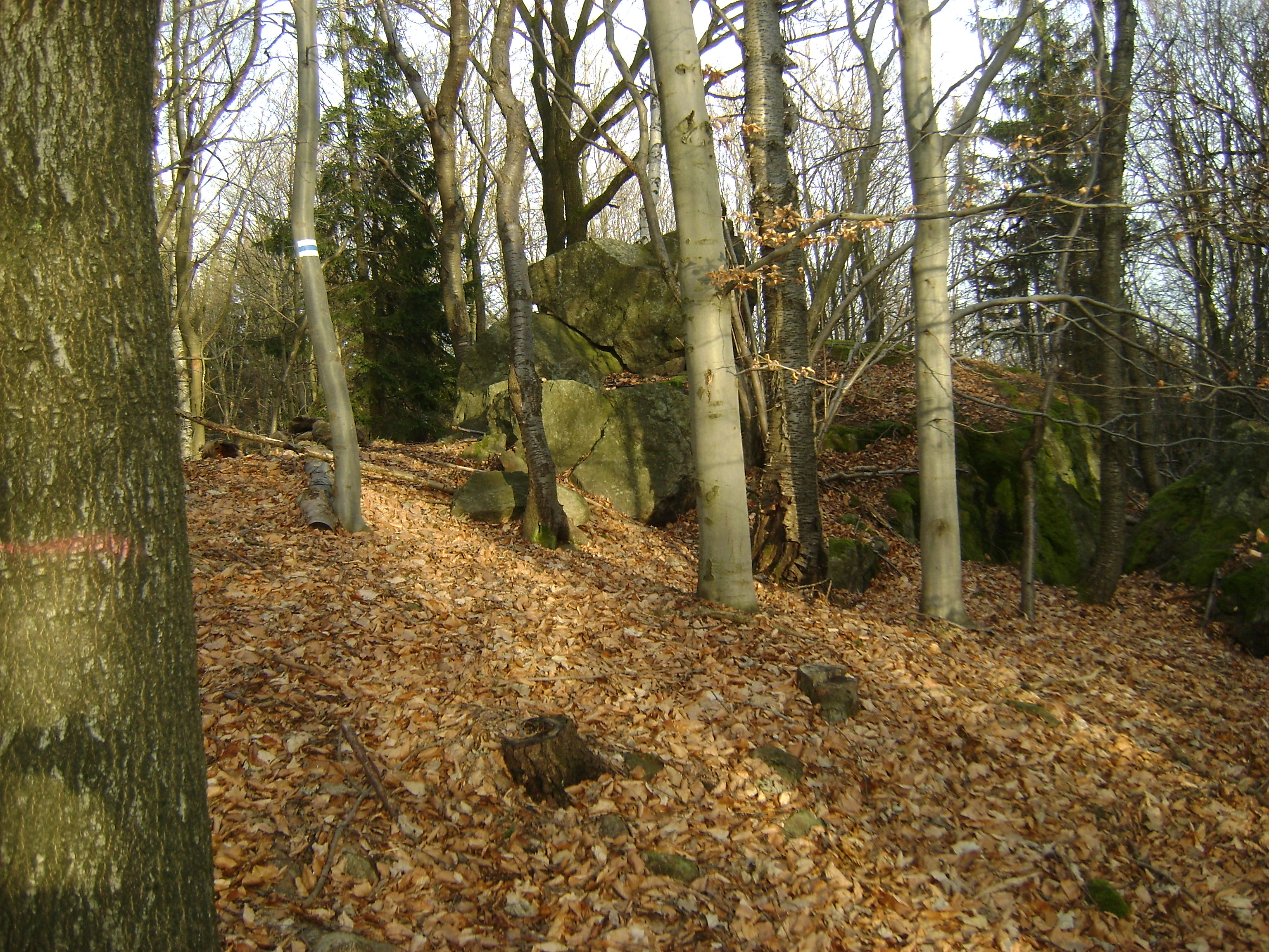 Grupa skalna na szczycie wzniesienia Klasztorzysko 631 m n.p.m. stanowiącym człon Gór Wałbrzyskich, zwanych Górami Czarnymi.